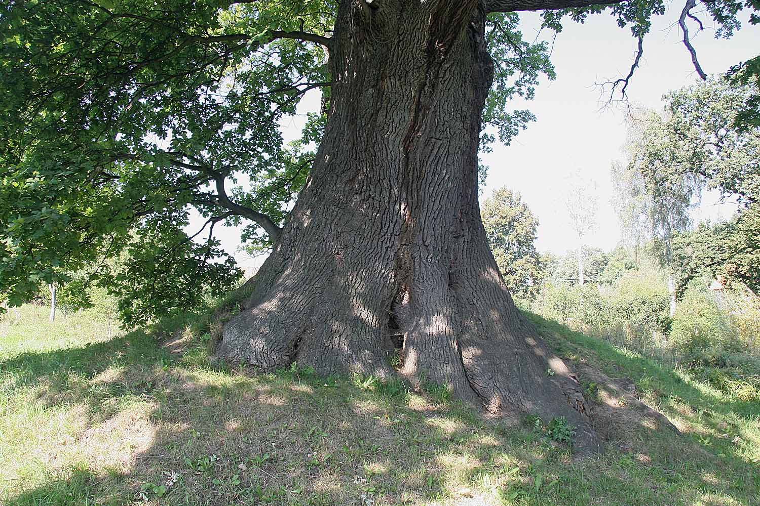 Památný dub letní v obci Lukavice v okrese Chrudim